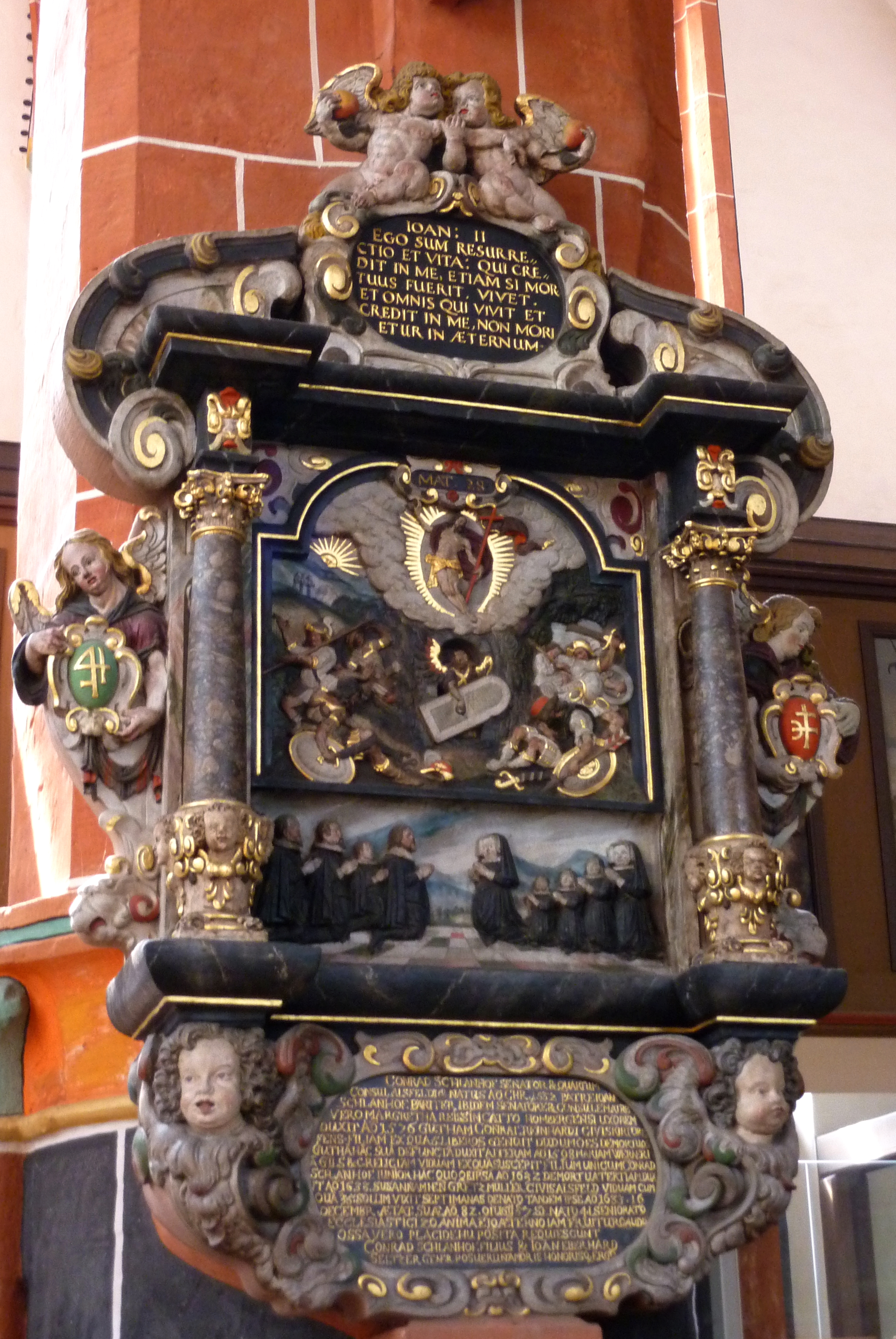 Evangelische Walpurgiskirche in Alsfeld im Vogelsbergkreis (Hessen), Epitaph für Conrad Schlanhof von 1633